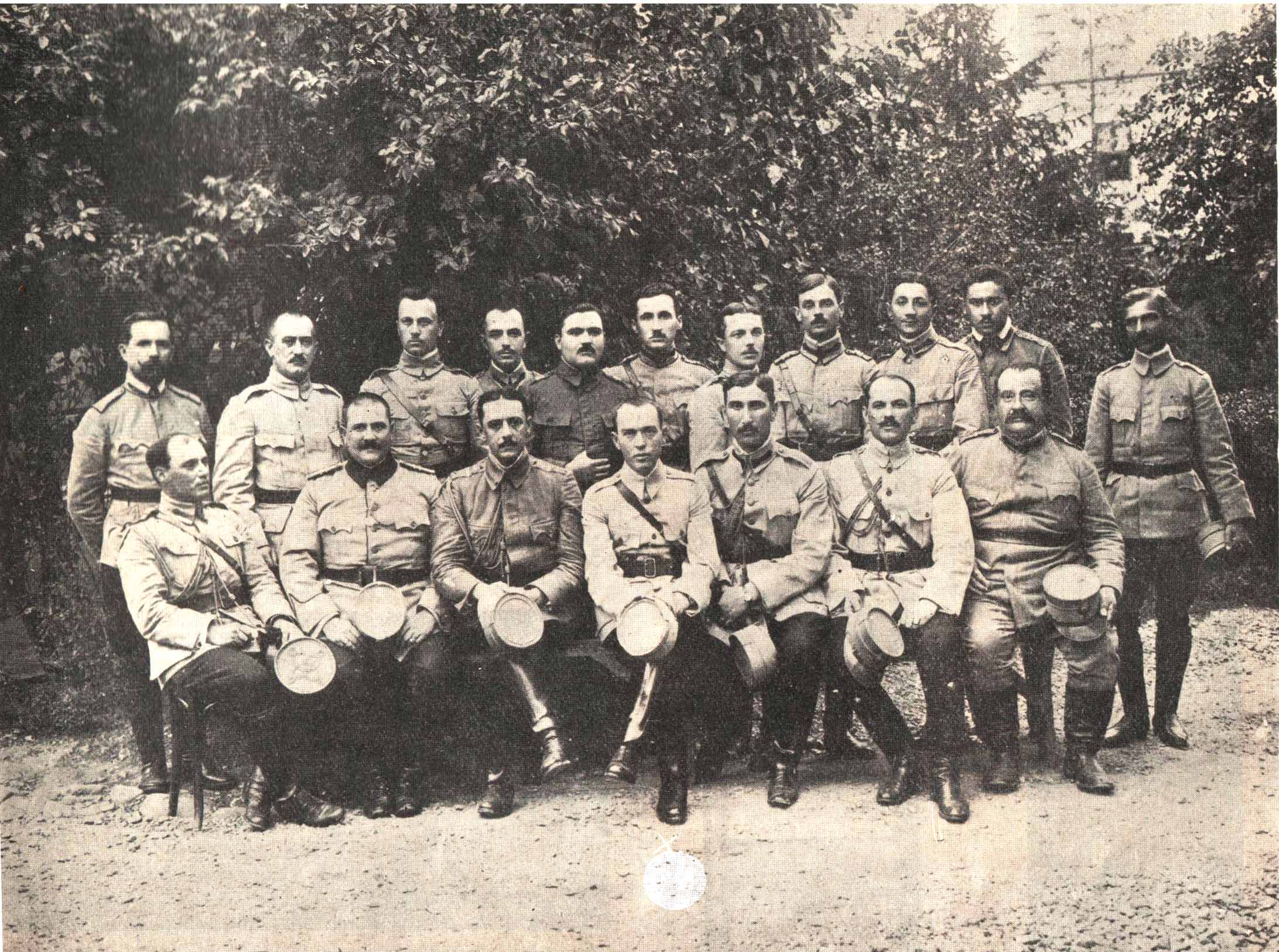 Ofițerii din Secția Operațiuni a Marelui Cartier General Român la Iași, România în ultimele zile a lunii martie 1918 (înainte de desființarea de la 1 aprilie 1918, odată cu demobilizarea MCG impusă de Puterile Centrale). În rândul de jos - în centru așezat: conducătorul Secției Operațiuni - Ion Antonescu